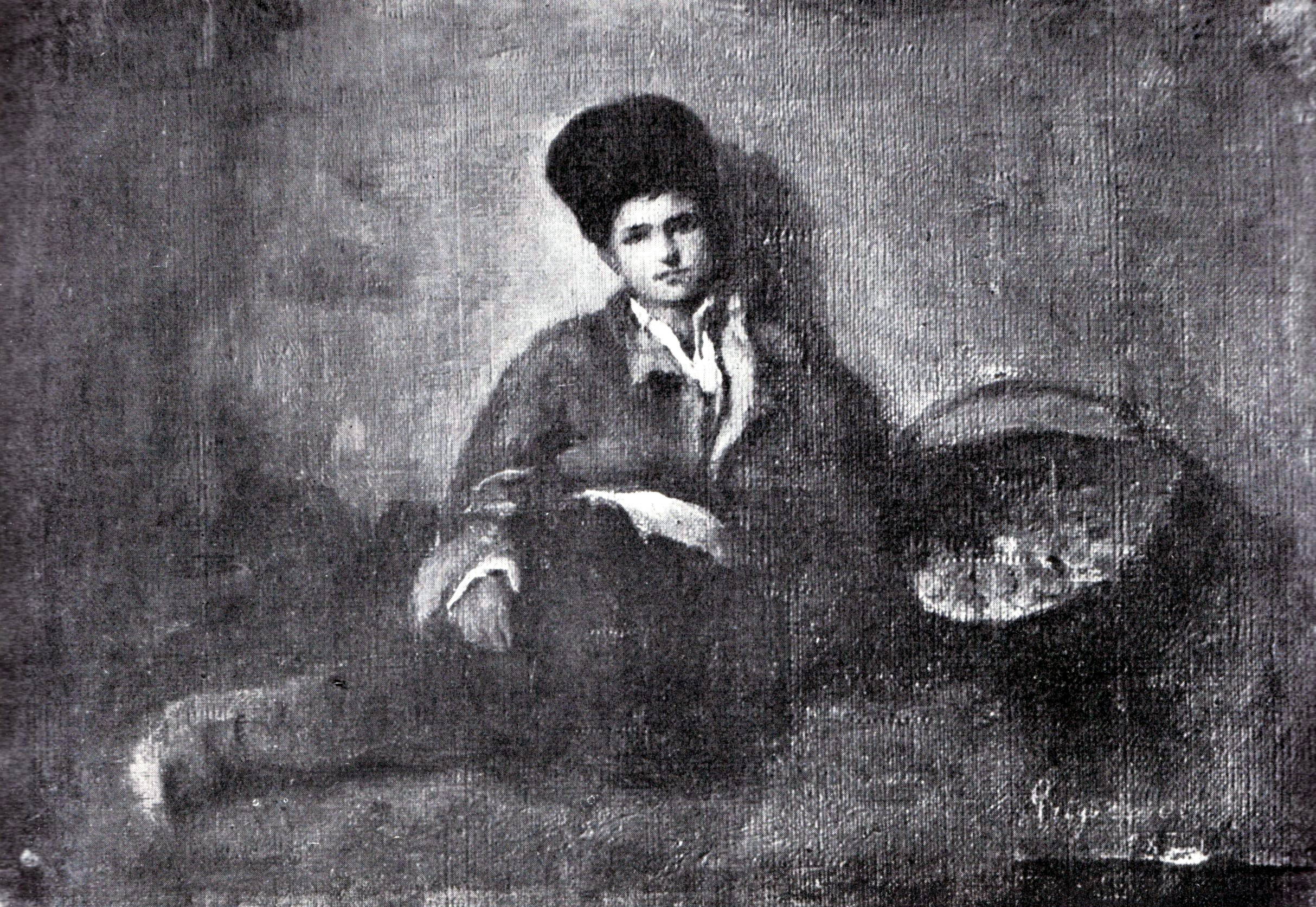 Limonagiul, ulei/pânză, 23x34cm, semnat și datat dreapta jos, zgâriat în pastă: Grigorescu 1870 - Colecția I.N. Dona